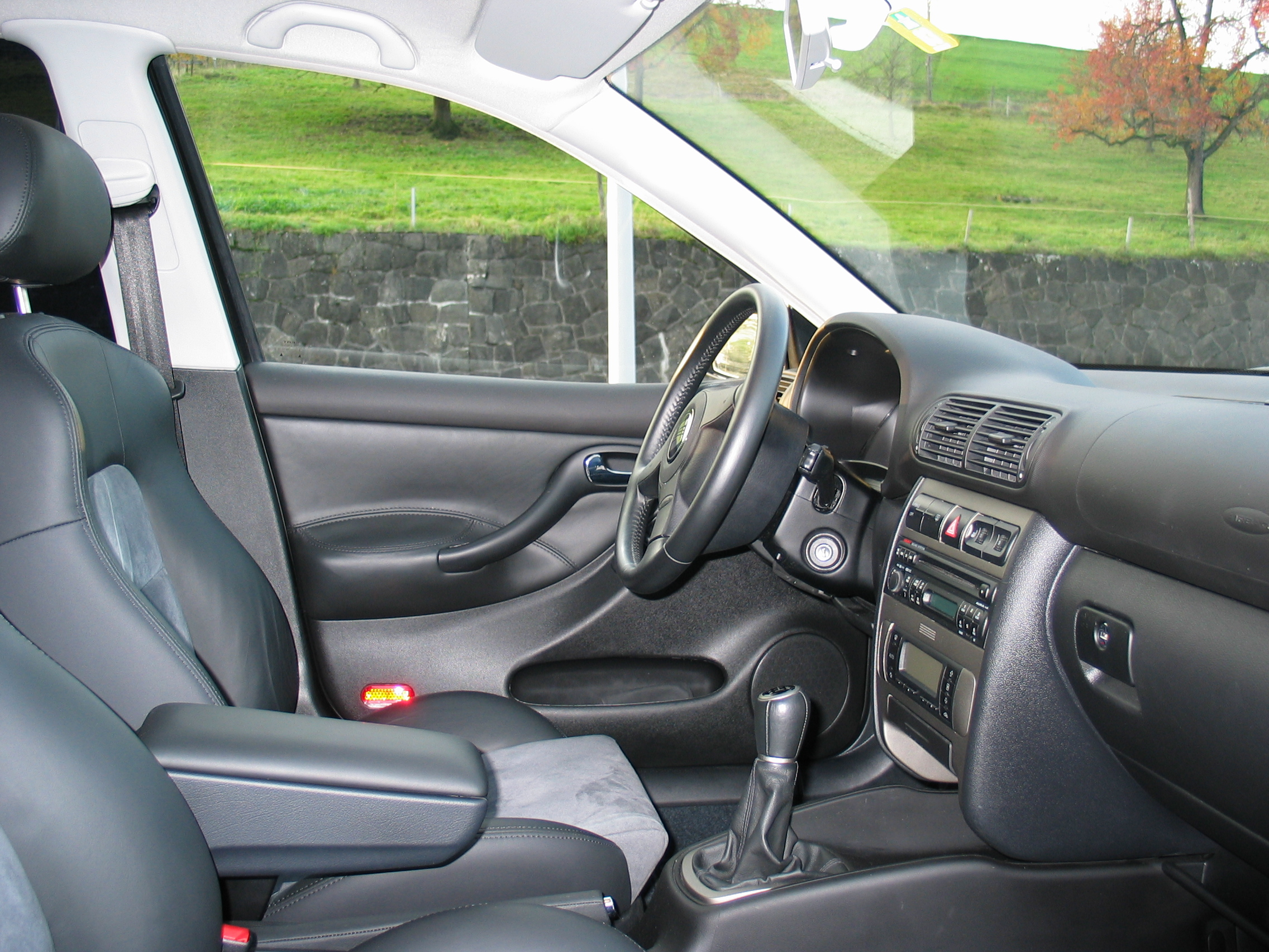 SEAT Leon Mk1 driver's seat left view.jpg